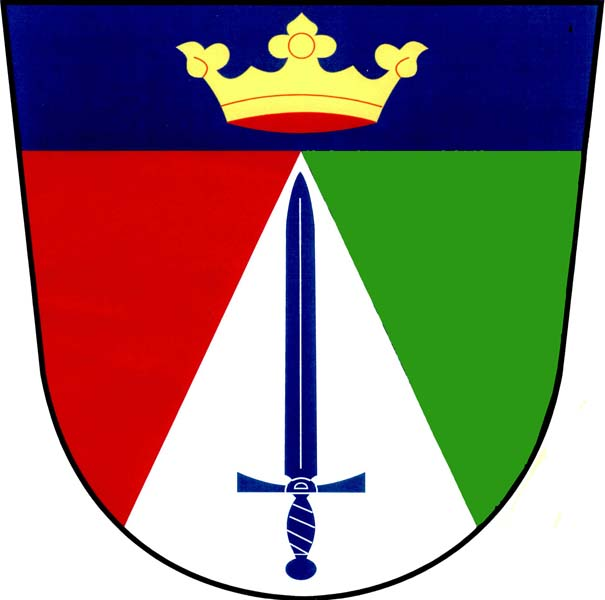 Znak obce Luštěnice